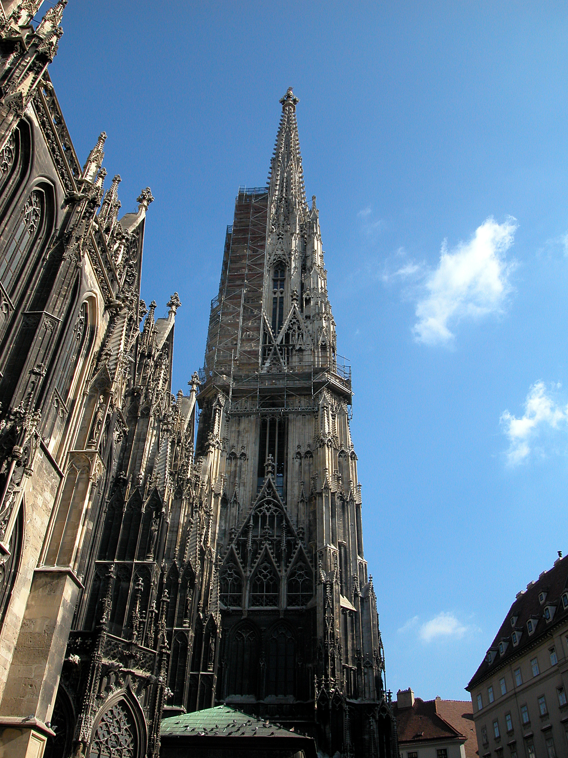 Der Stephansdom in Wien Source: Alexander Umbricht, 1. Okt. 2002